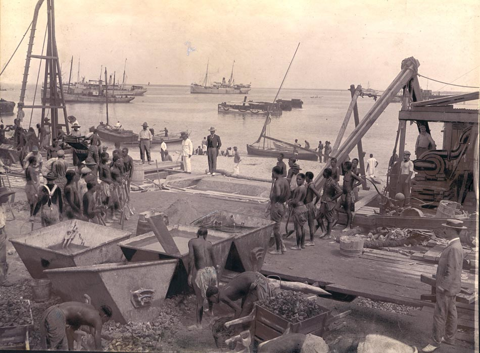 Nova Muralha. Amassadouros